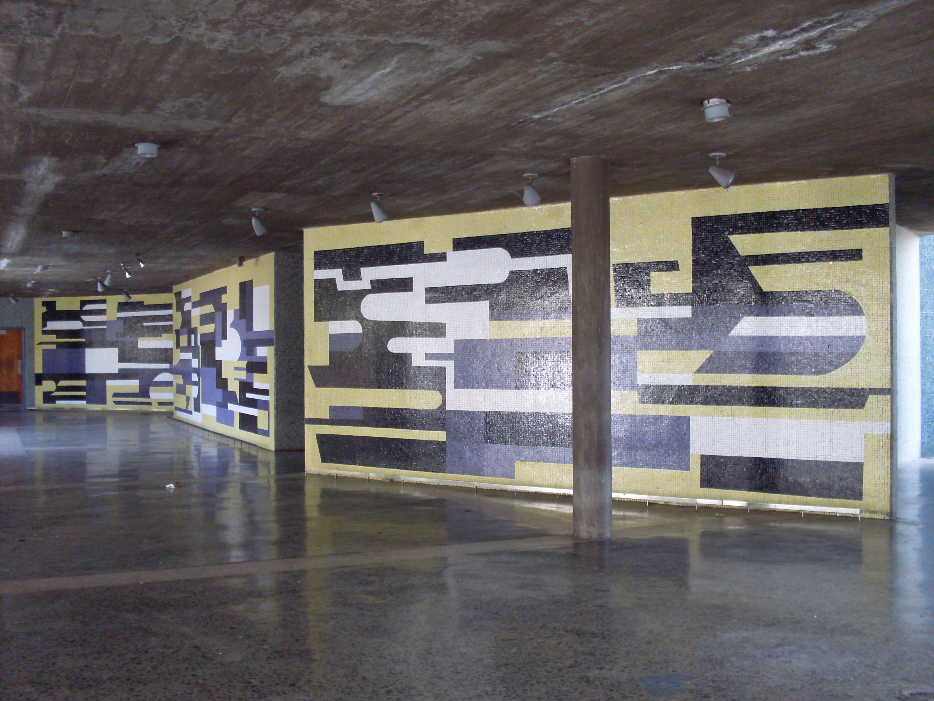 Mural de Pascual Navarro, 1954. Título: Sin título. Autor: Pascual Navarro. Año: 1954. Ubicación: Universidad Central de Venezuela, Edificio de la Sala de Conciertos, fachada principal.